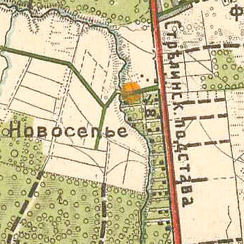 Деревня Новоселье (Стрелинская Подстава).